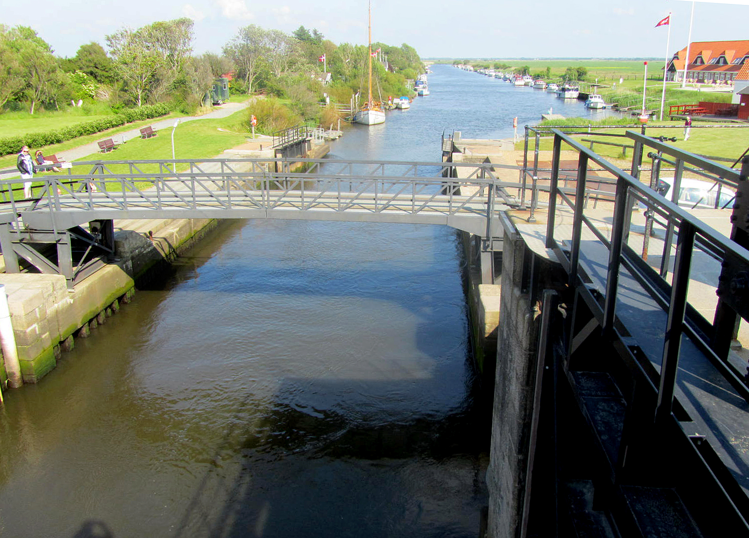 Kammerslusen ved Ribe Ås udløb set mod øst